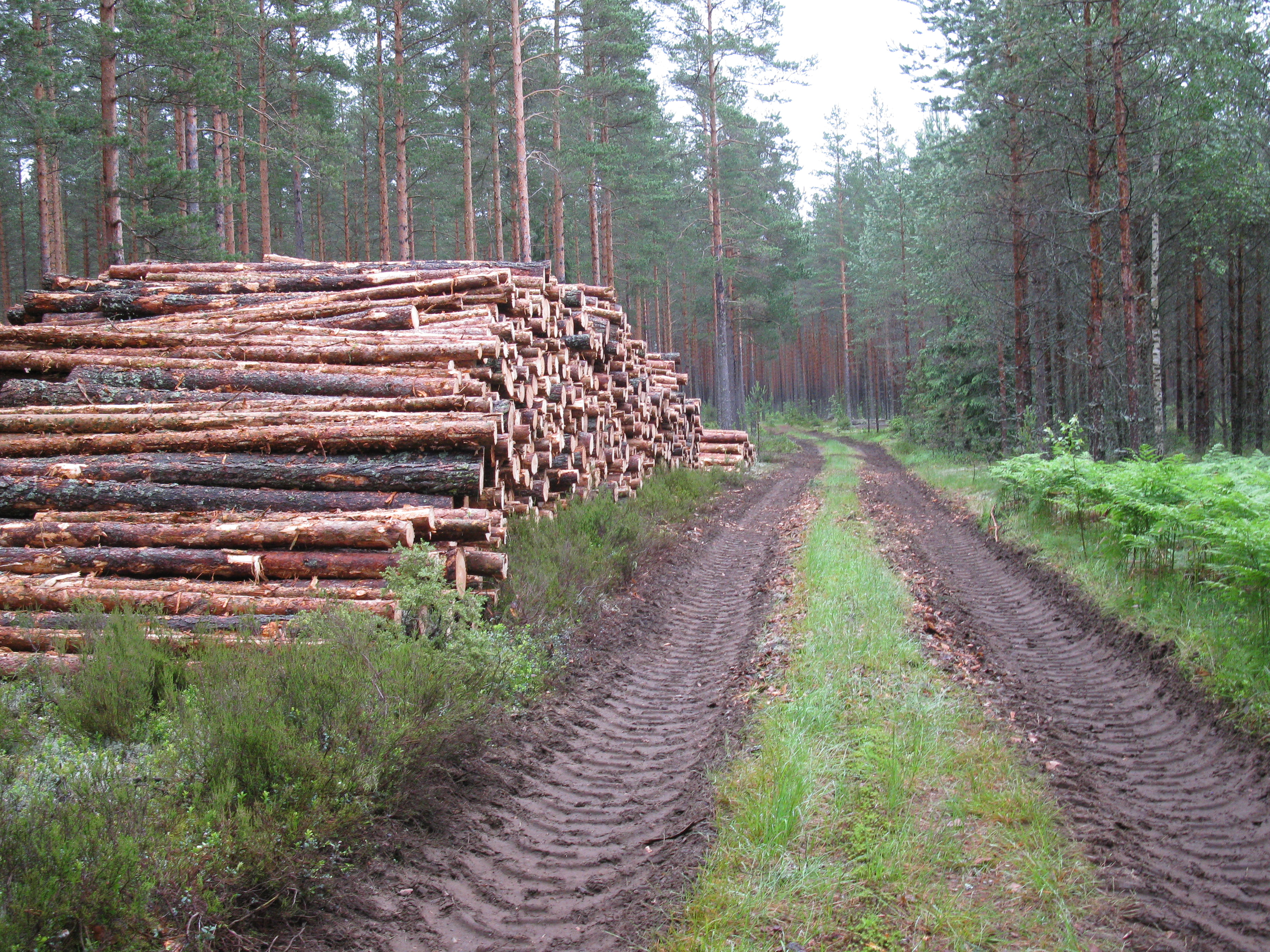 Koneellista metsänkorjuuta eteläisessä Suomessa kesäkuun lopulla 2014.